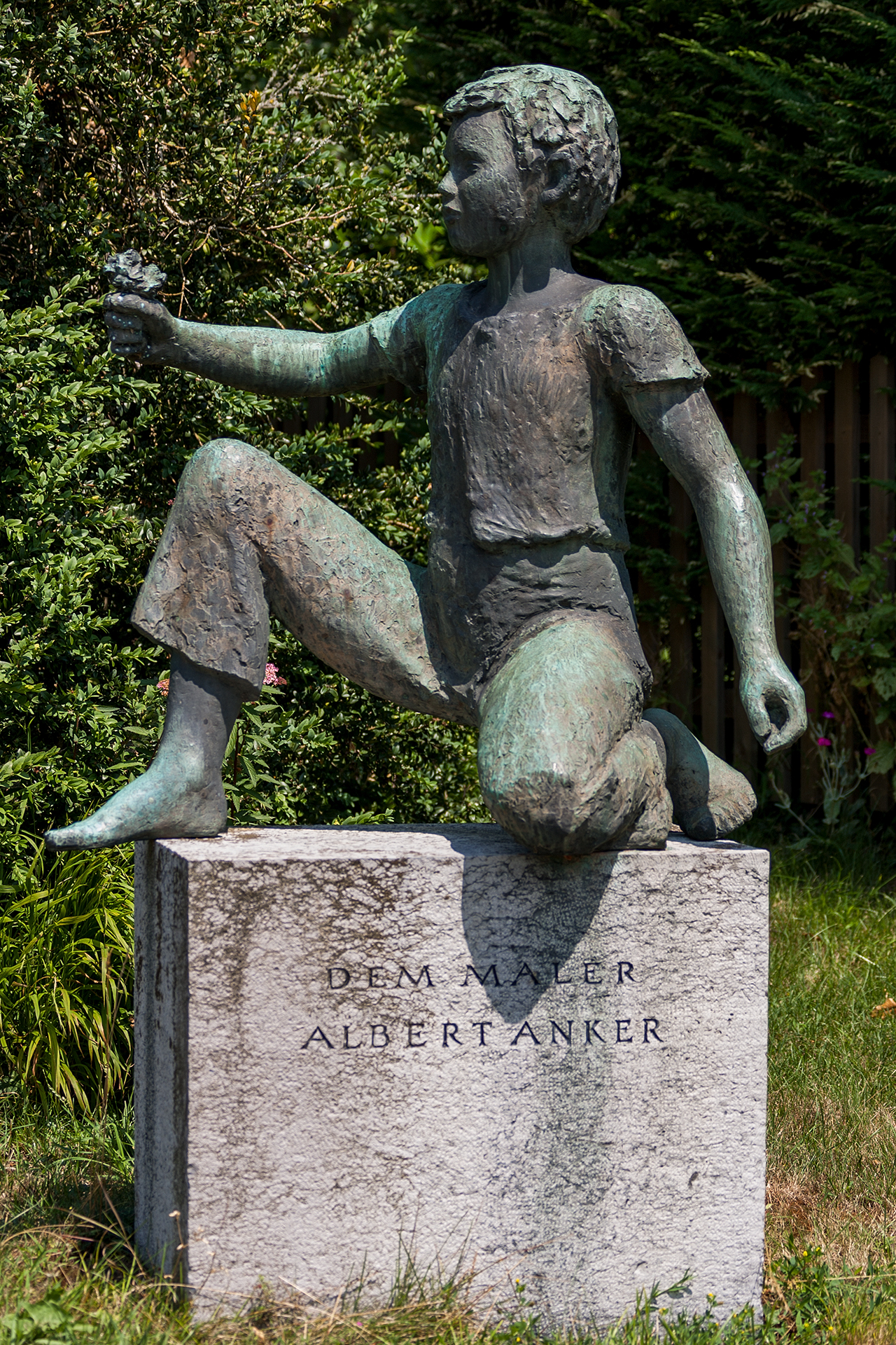 Skulptur in Erinnerung an den Schweizer Maler Albert Anker beim "Ankerhaus" in Ins (BE)